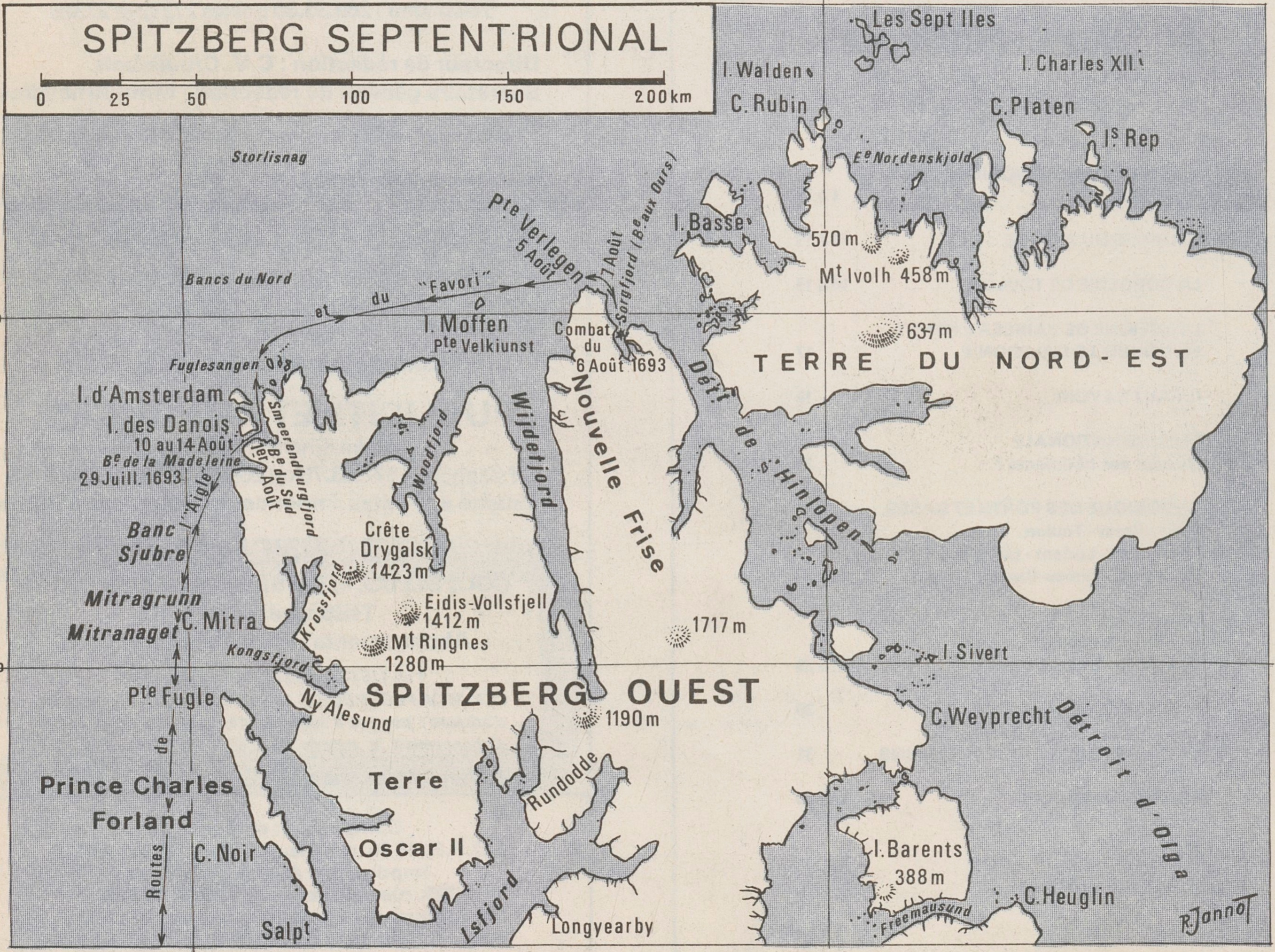 Carte permettant de suivre la progression des vaisseaux français l'Aigle et le Favori lors de la campagne de 1693 contre les baleiniers hollandais dans l'archipel du Spitzberg. Combat de la Baie aux Ours. (Guerre de la Ligue d'Augsbourg).